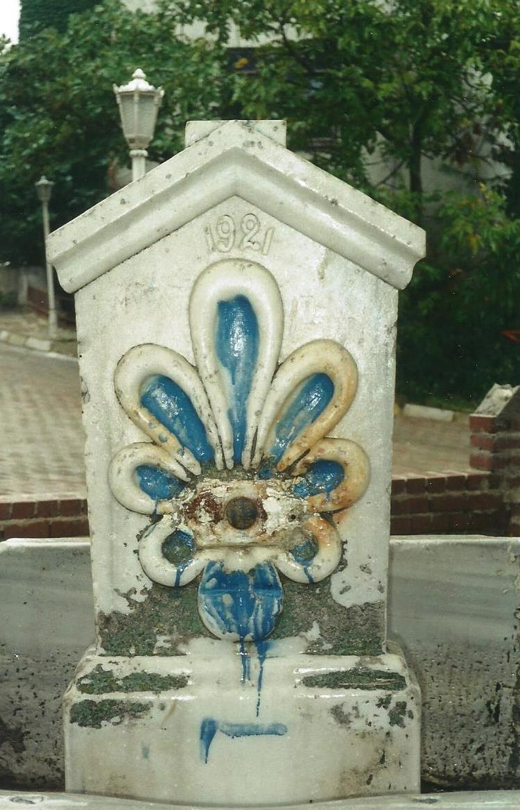 Marble fountain in the middle of the square in fron of the old greek elementary school.